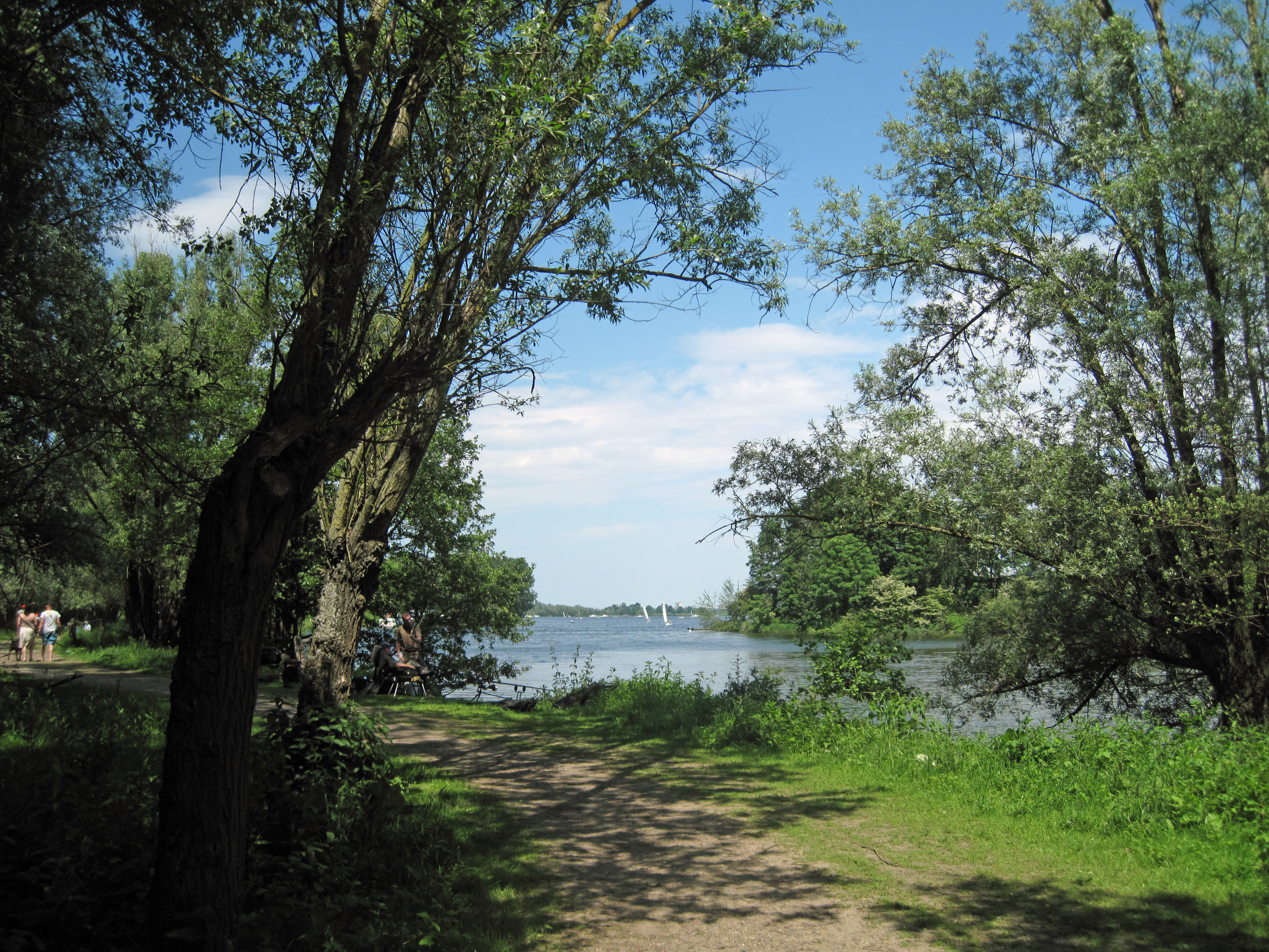 Vue sur les plans d'eau d'Oost-Maarland